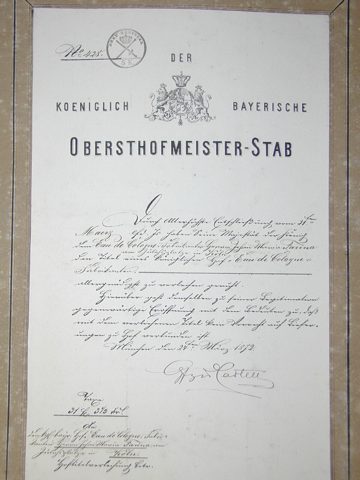 Hoflieferanten Diplom von König Ludwig II für Farina in Köln (1872)